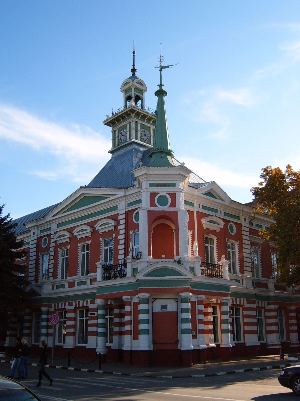 Сегодня в здании находится Азовский краеведческий музей-заповедник